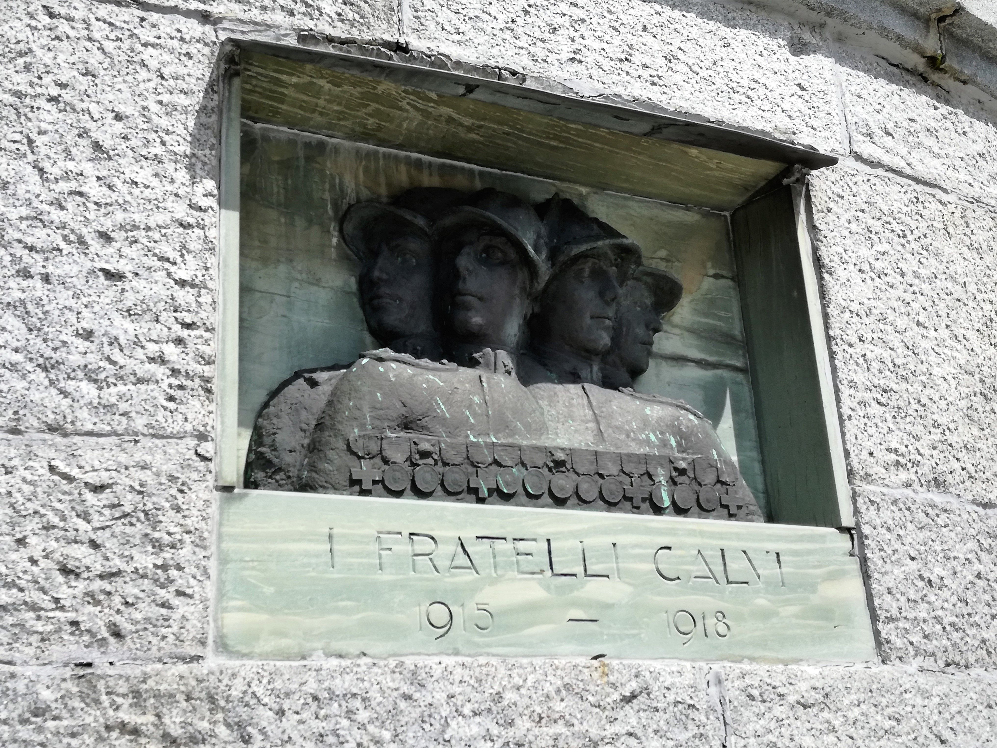 Kriegerdenkmal Tonalepass - Gedenktafel Gebrüder Calvi